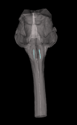 Enbor entzefalikoan nukleo anbiguoaren kokapena